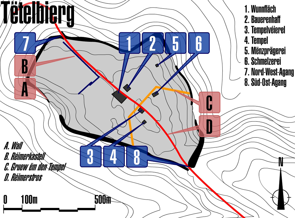 Plang vum Tëtelbierg